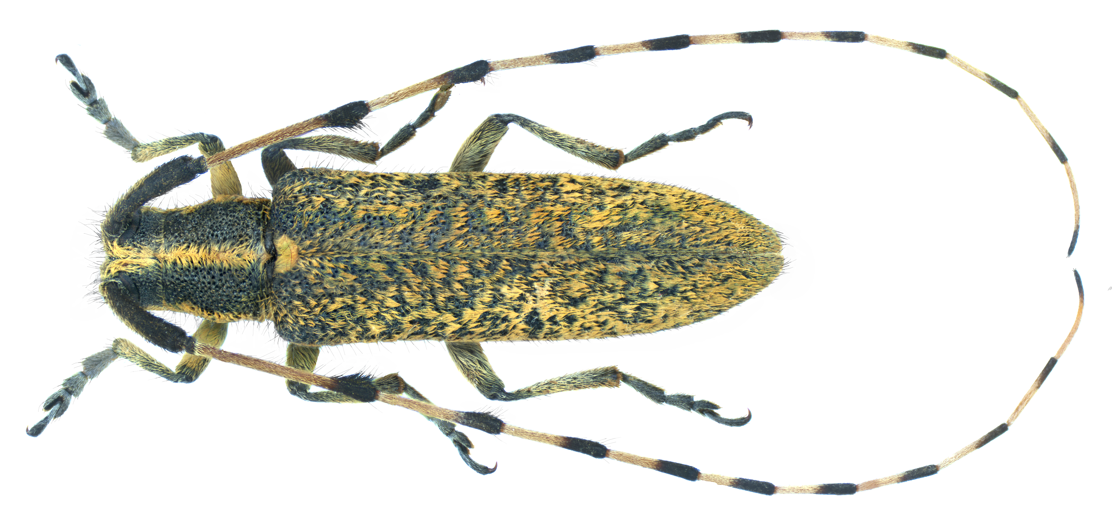 Family: Cerambycidae Size: 15 mm Location: Iran North, Prov. Quazvin, Elburz, Ibrahim Abad, Tallran Road, 2370 m leg. A.Skale, 28.V.2008; det. A.Weigel, 2008 Photo: U.Schmidt, 2013